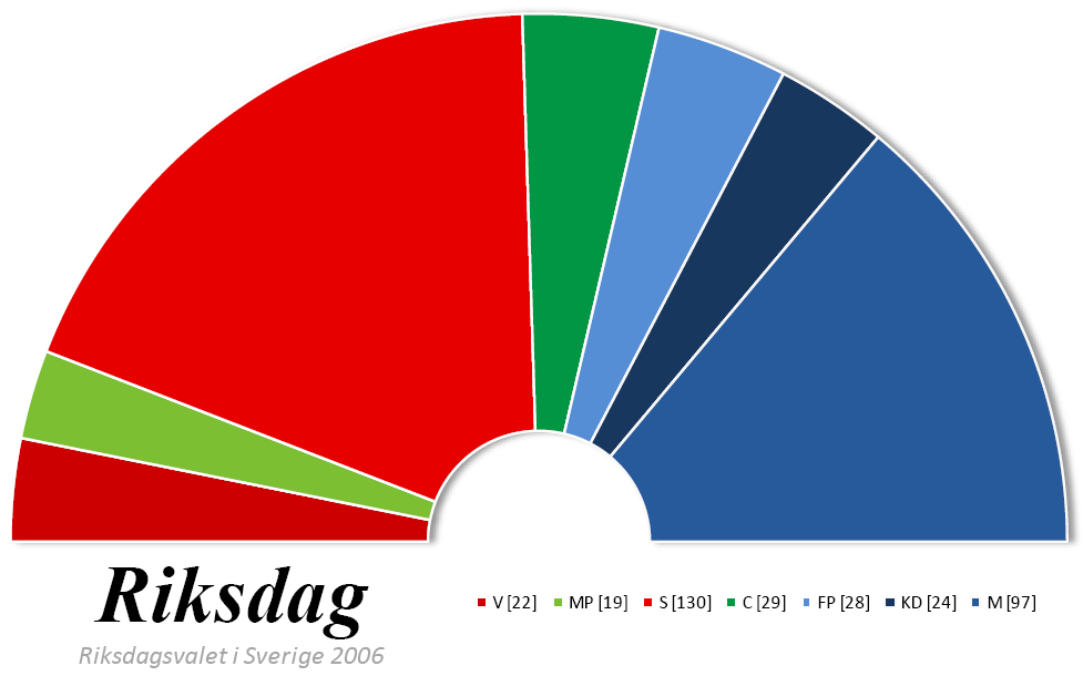 Riksdag suédois après les élections législatives de 2006